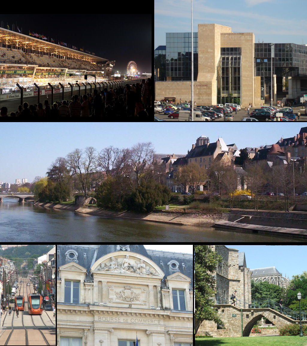 Images, de haut en bas et de gauche à droite : 24 heures du Mans by night par Sander. Place des Jacobins et Palais de Justice par Trowa Barton. Rive gauche de la Sarthe par User:Le Mans Rue Gambetta par Le Mans La Bourse du Mans par Le Mans Jardins de Ronsard par Le Mans